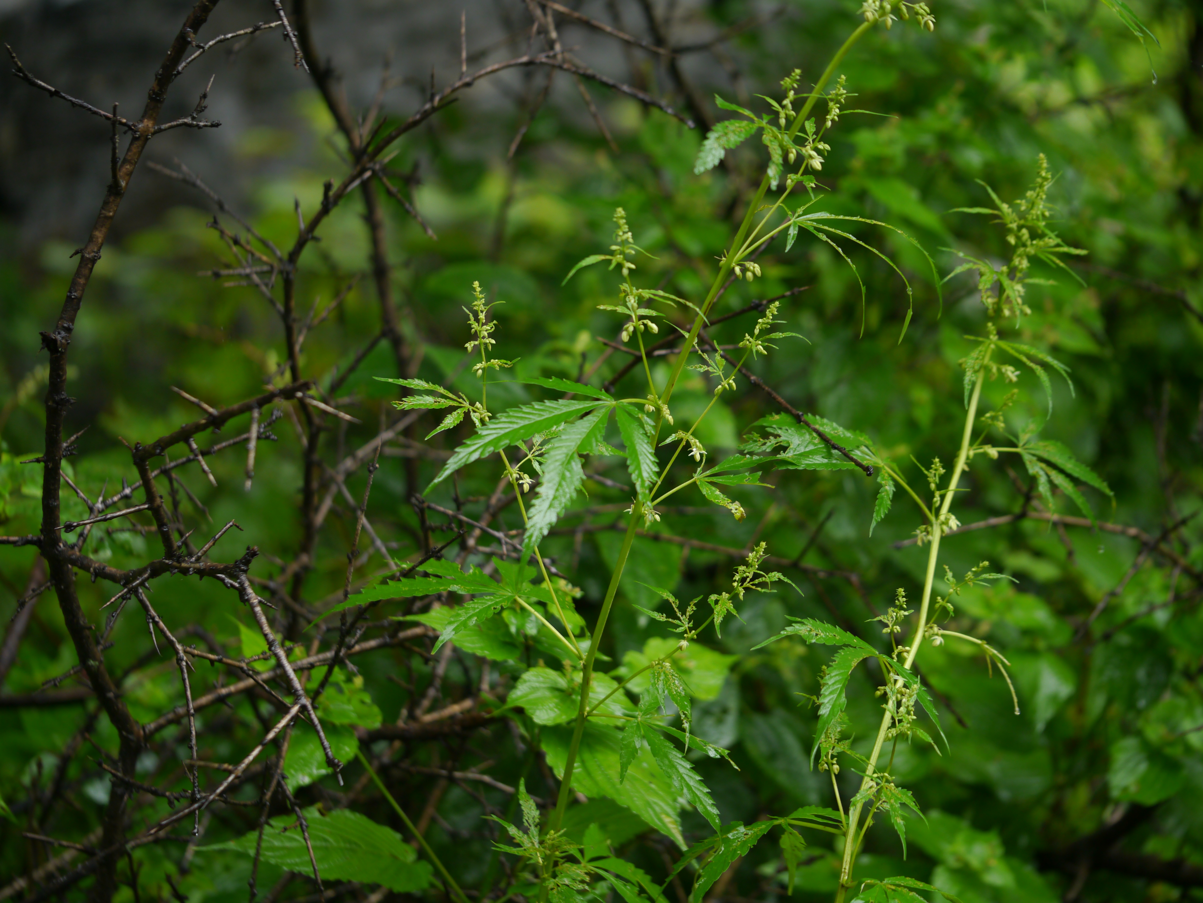 Cannabis sativa